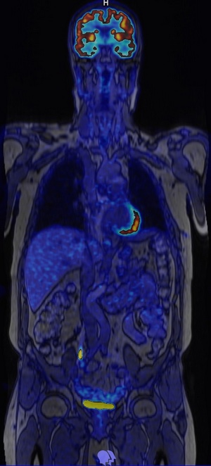 Przykładowy obraz uzyskany za pomocą urządzenia PET/MR w firmie Bioskaner